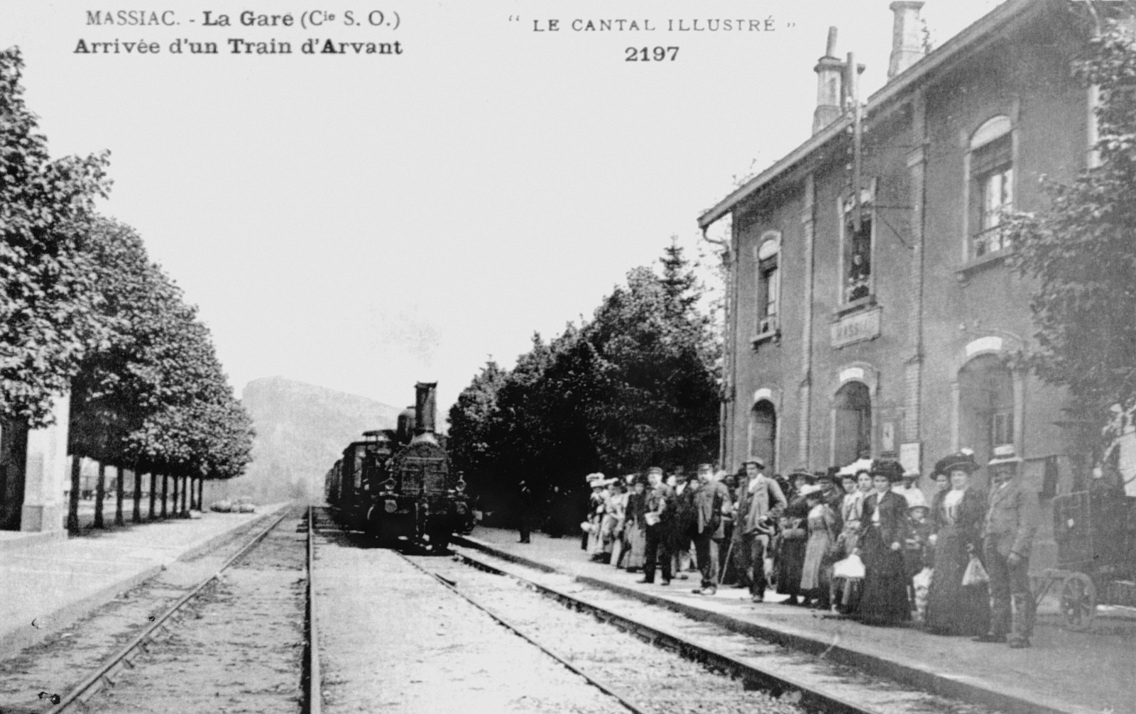 Arrivée du train à Massiac Cantal France